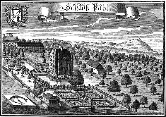 Schloss Pähl; Kupferstich von Michael Wening